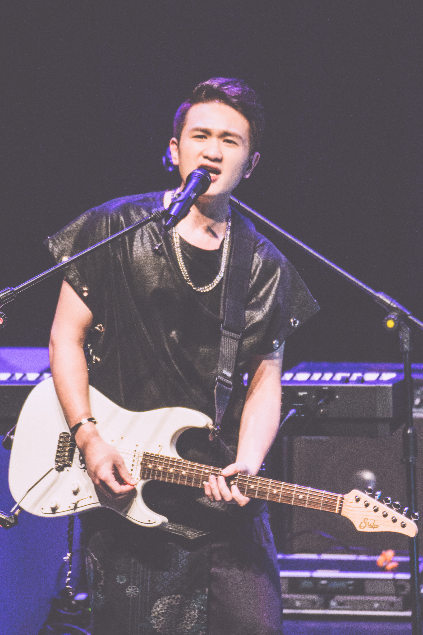 中文（台灣）: Mr Danny